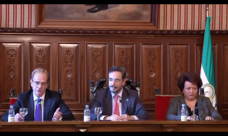 Moises Muñoz pleno renuncia Felipe Lopez